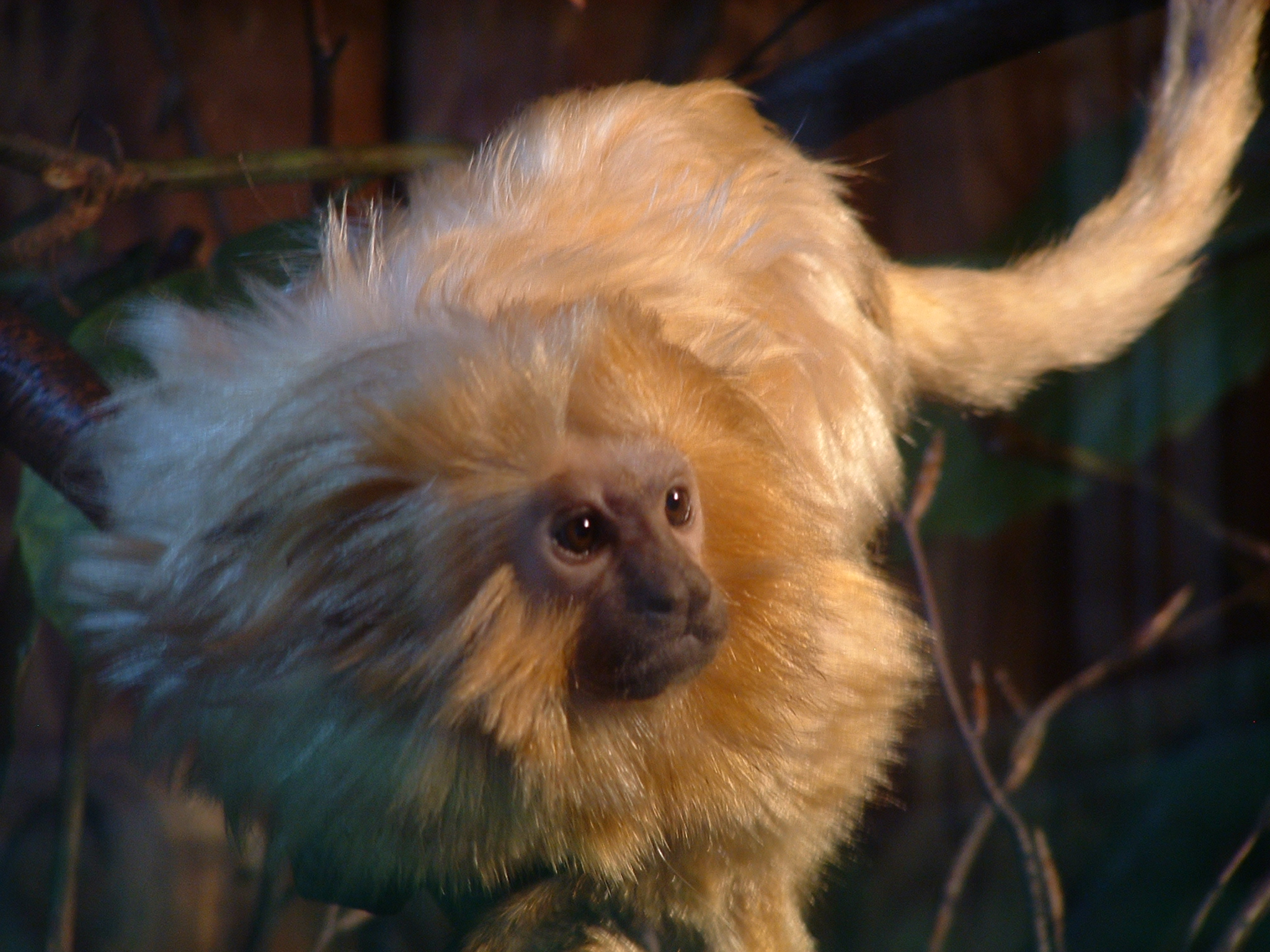 Lwiatka (ZOO w Krakowie)